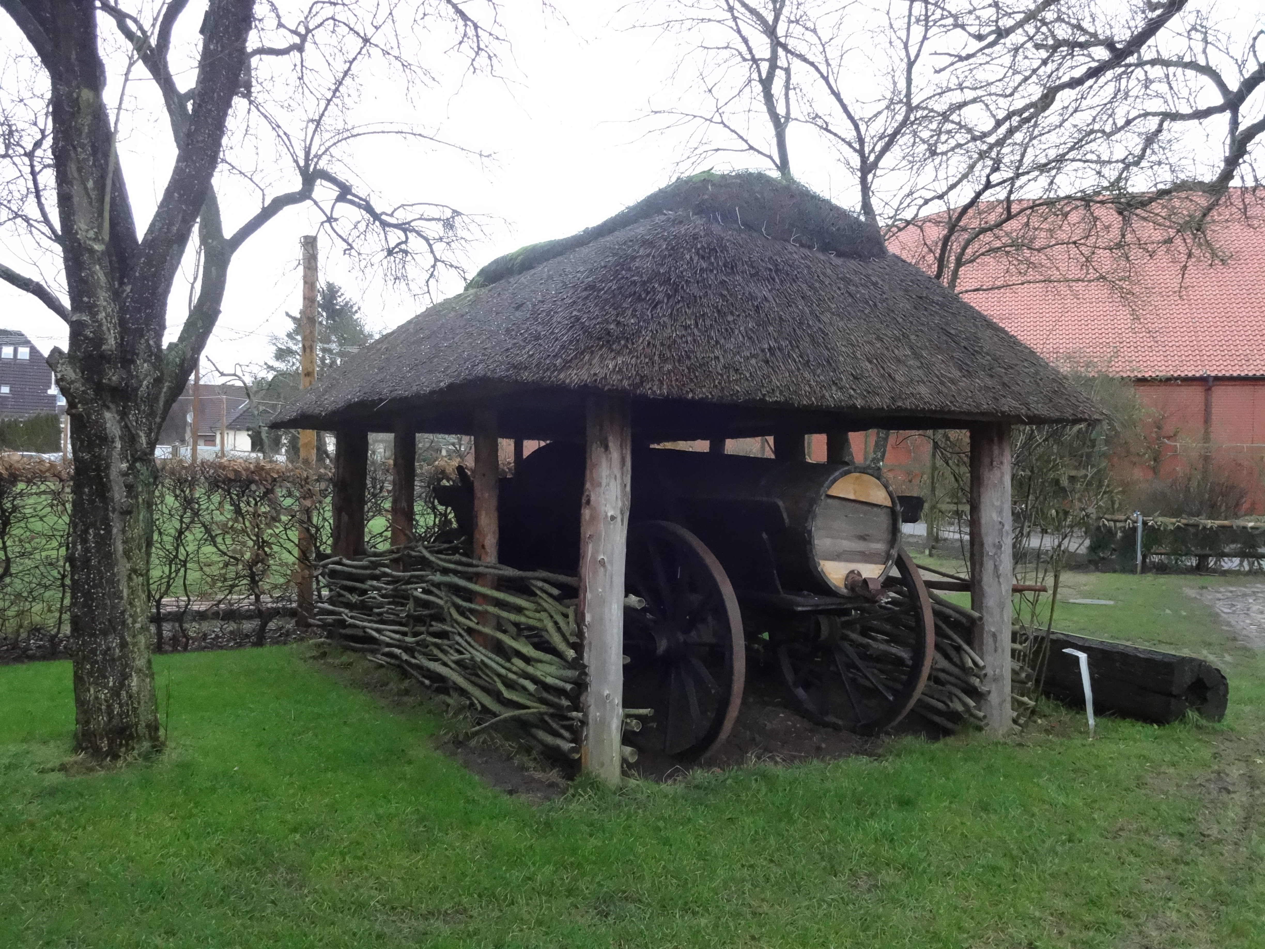 als Kulturdenkmal geschützter Wagenschauer im Jungfernstieg 4a in Meldorf